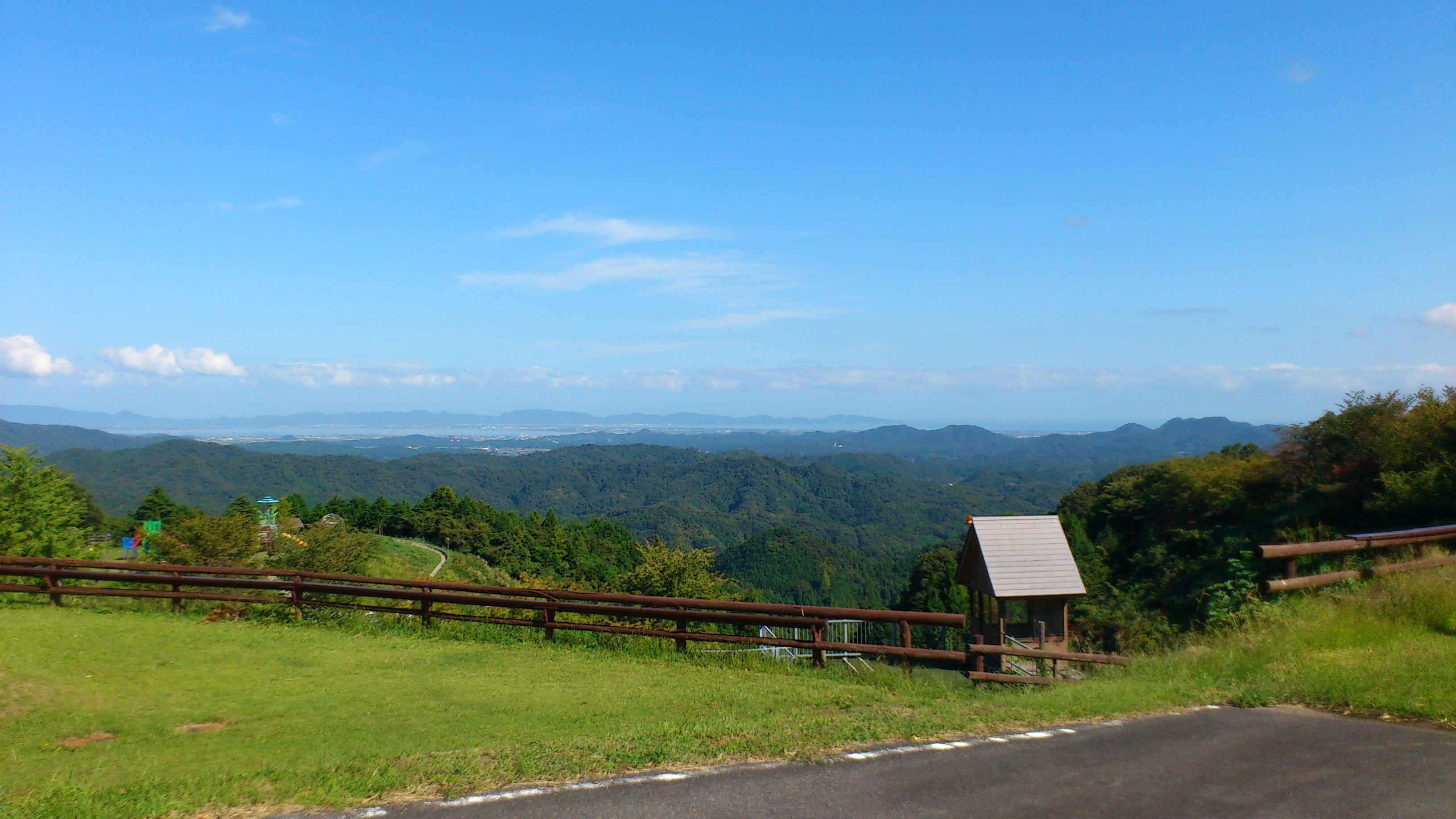 上の台の山頂からの眺望。天候の良い日は島根半島、隠岐の島が見える。